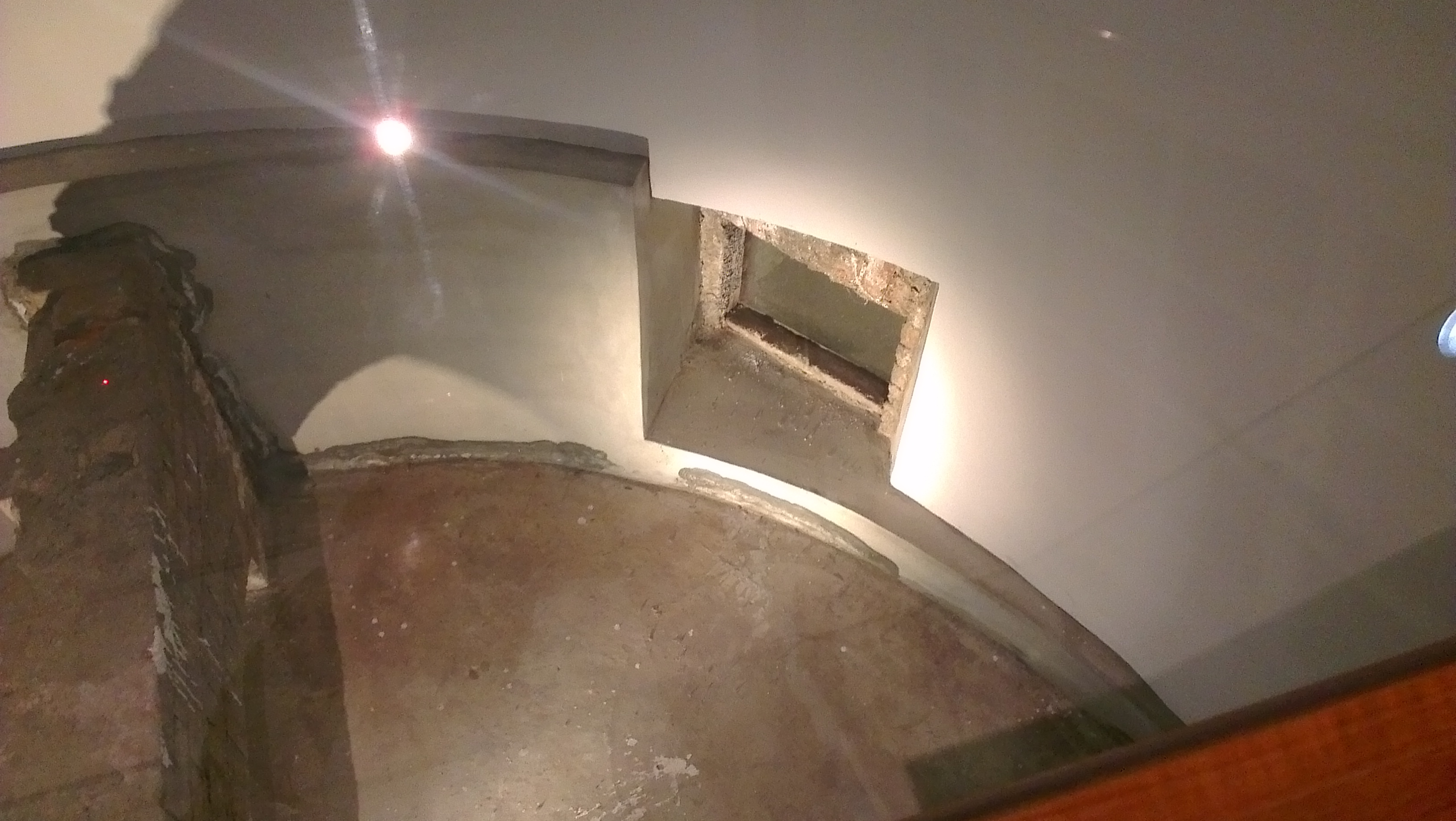 國立台灣文學館 氣孔